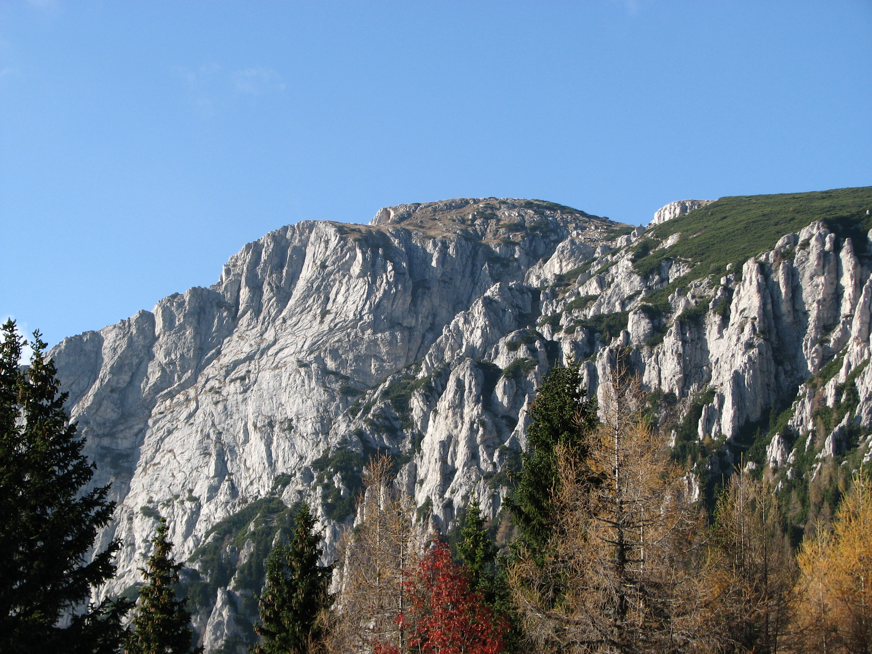 Južna stena Pece in njen najvišji vrh Kordeževa glava (2125 m)